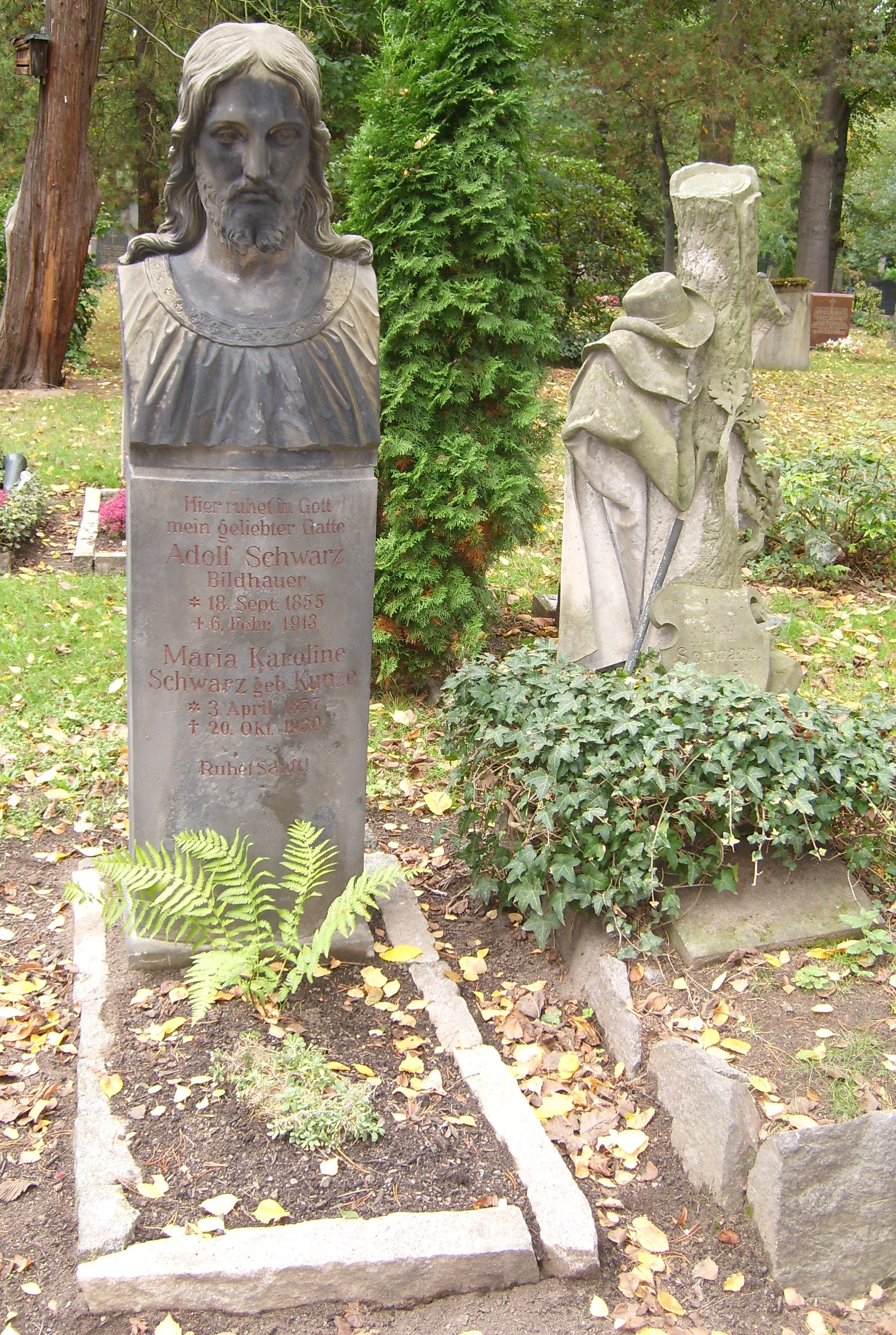 Grabstein Adolf Schwarz deutscher Bildhauer